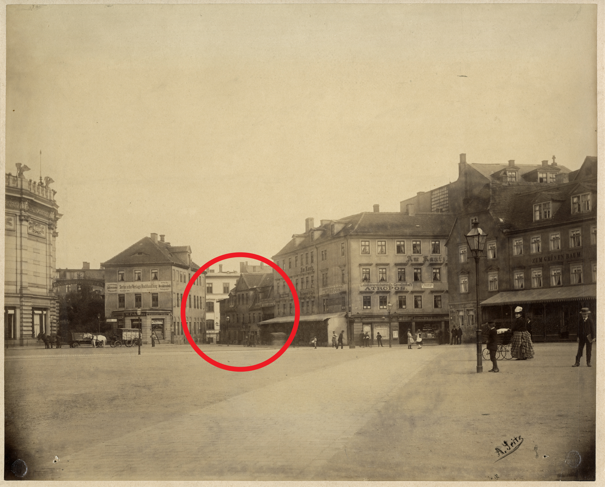 Druckerei Wigand am Roßplatz 3b, Fotografie zwischen 1884 und 1888